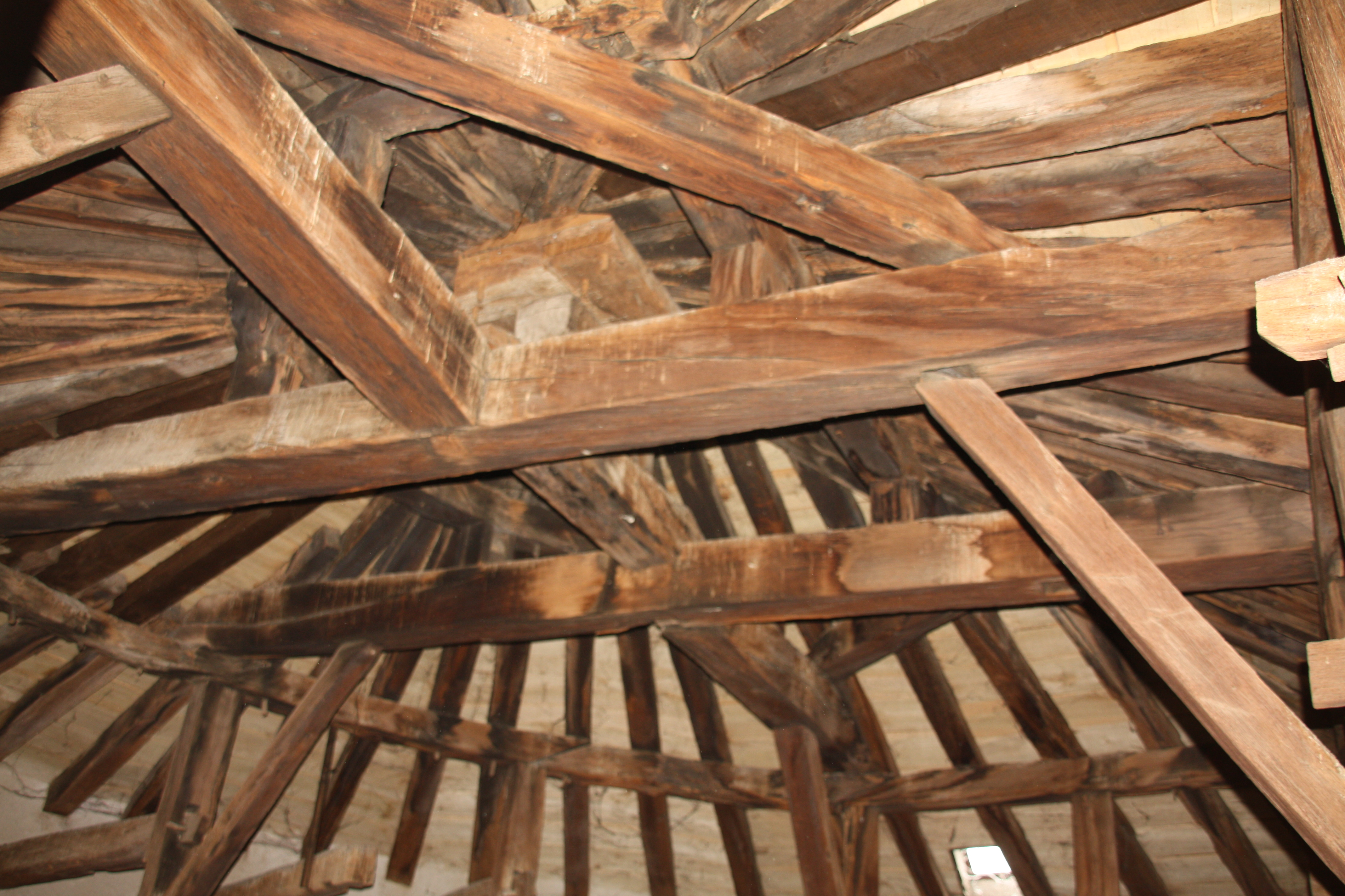 Charpente du système de hourds de la Tour Nord du Château des Tours à Anse.